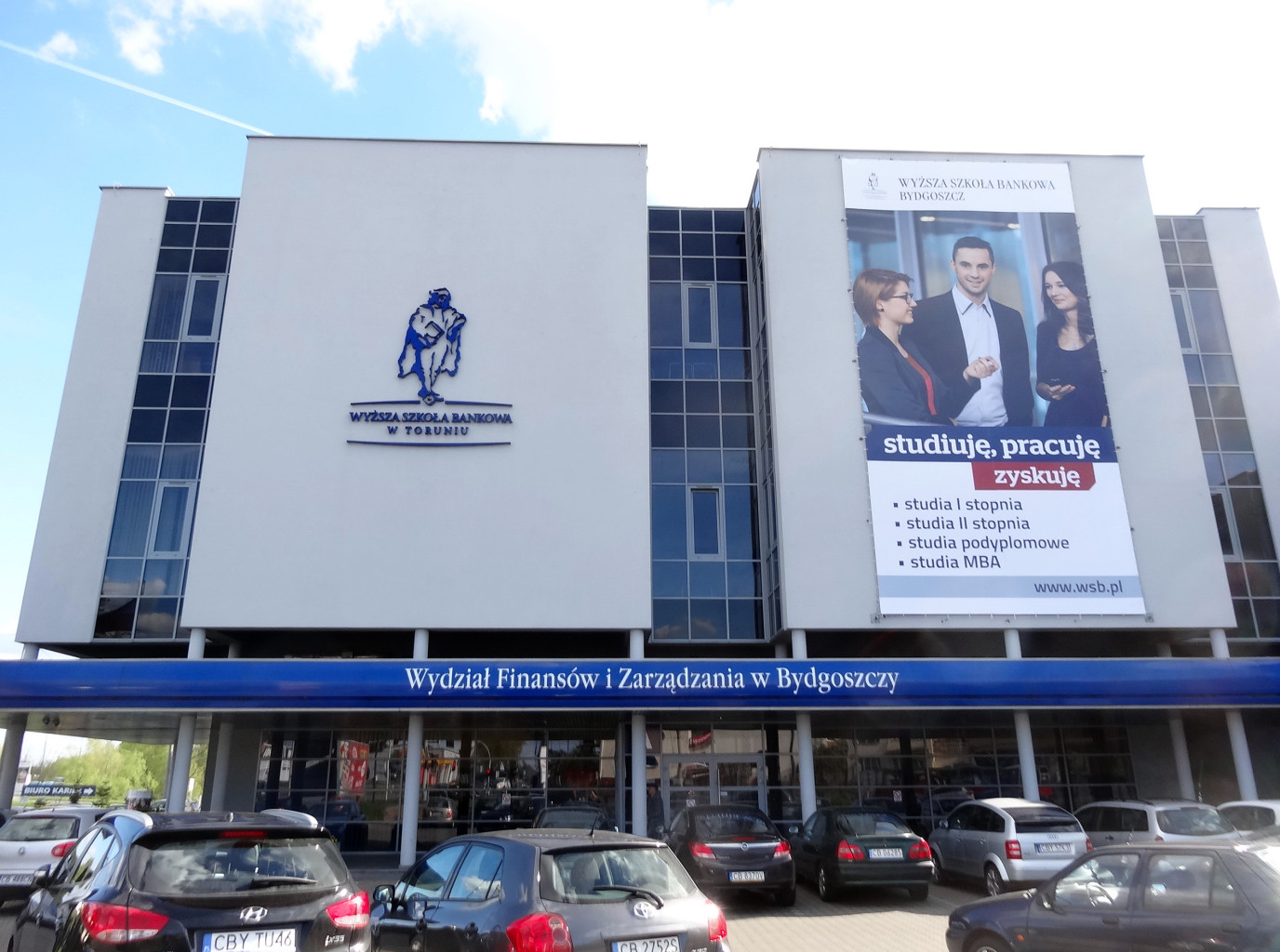 Wyższa Szkoła Bankowa w Toruniu Wydział Finansów i Zarządzania w Bydgoszczy